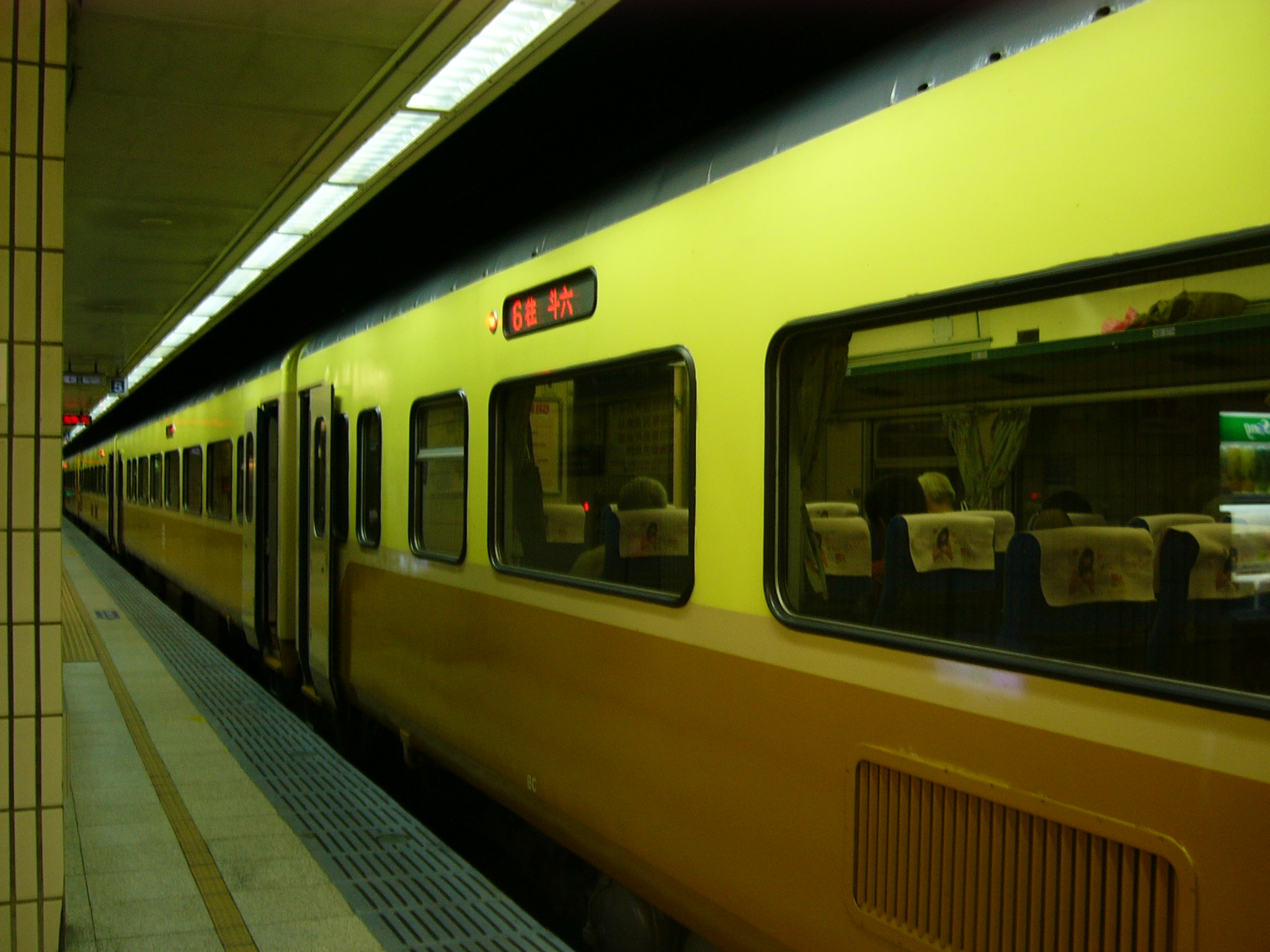 一列已裝設單階滑塞式自動門的台鐵EMU300型電聯車停靠台北站，其終點站為斗六站。